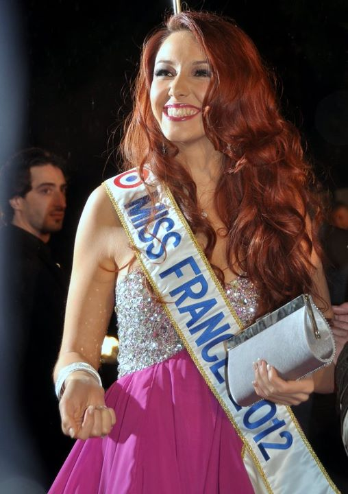 Delphine Wespiser aux NRJ Music Awards